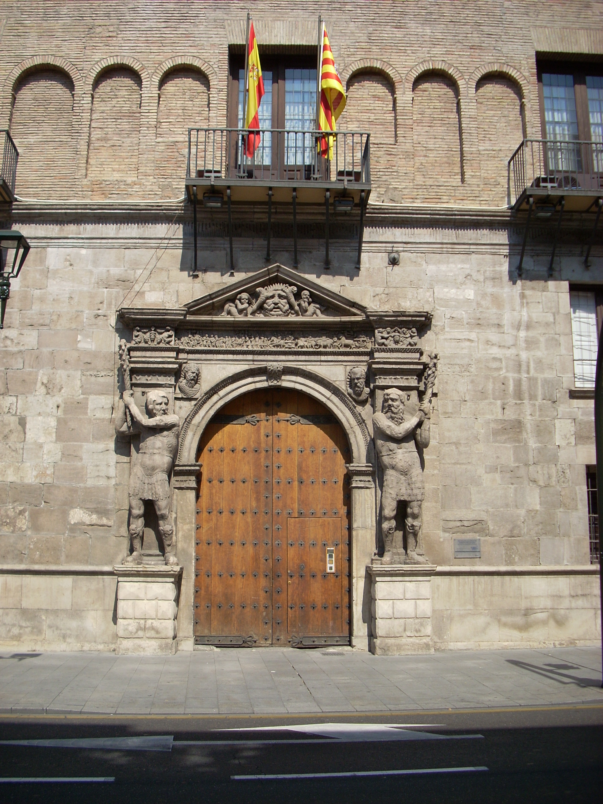 Palazzo dei Luna, Saragozza, Spagna